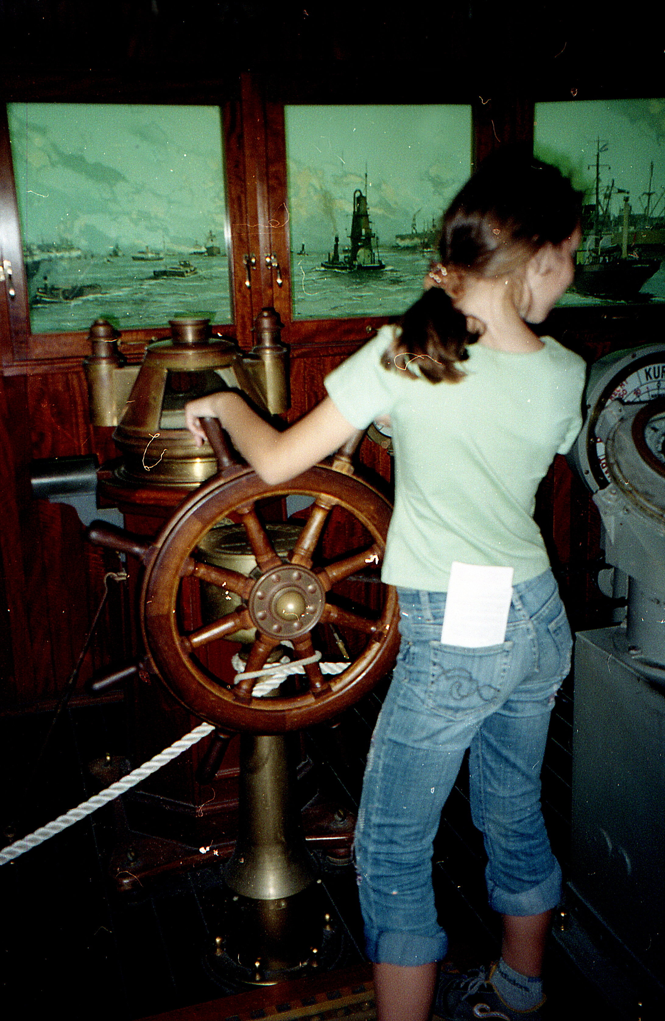 Рулевая рубка судов начала ХХ века.